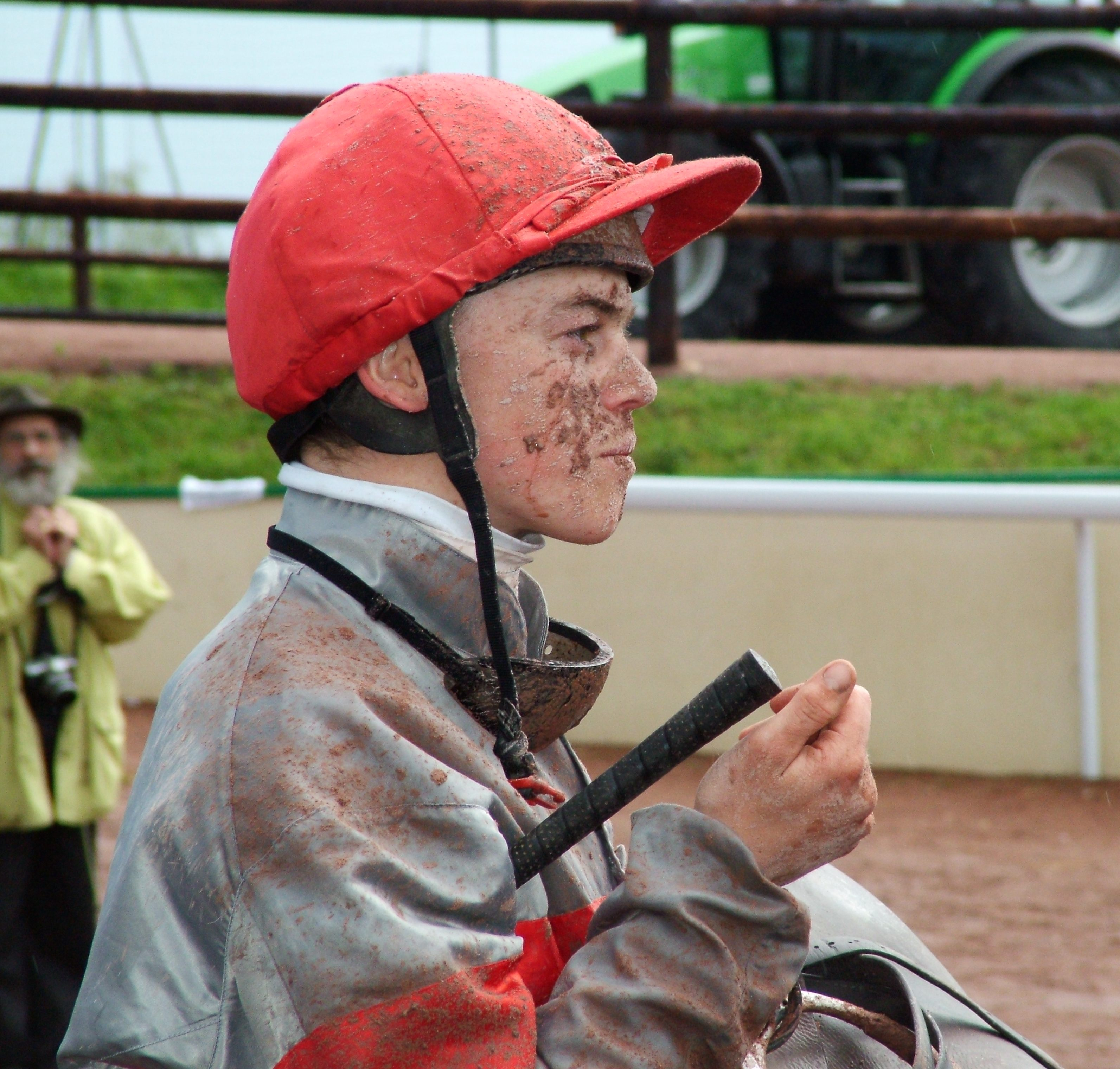 Hippodrome de Chartres